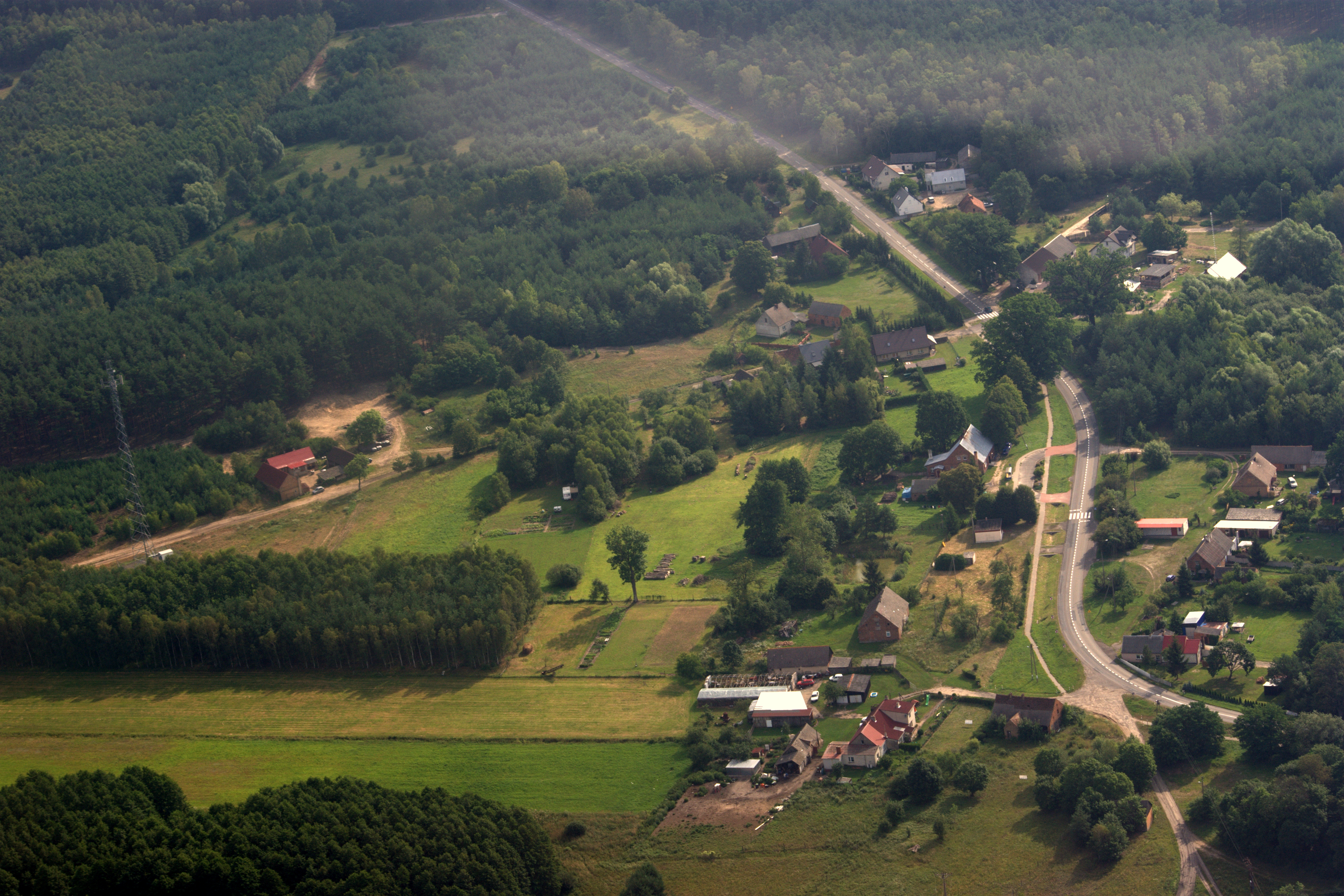 Klempicz z lotu ptaka - 30.07.2016